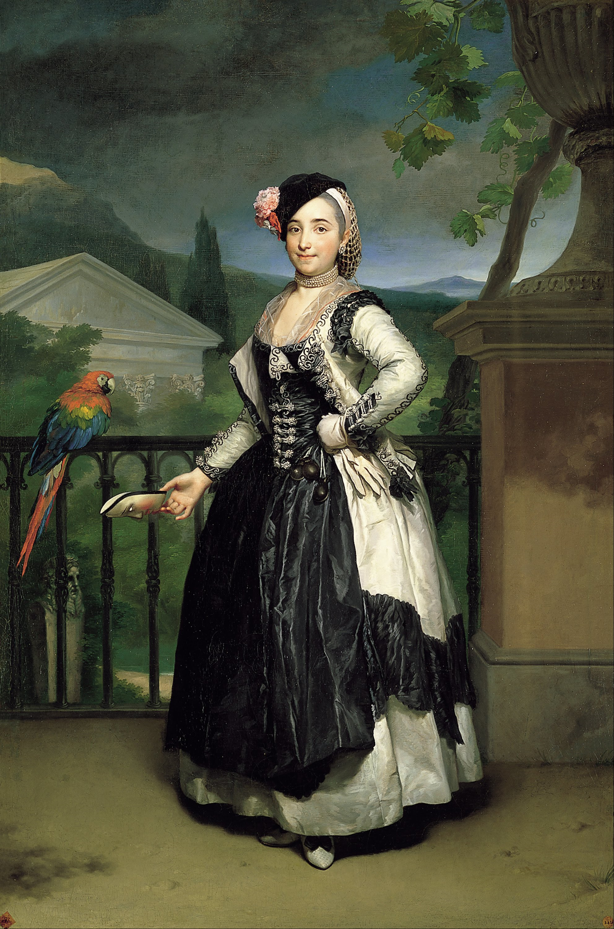 Retrato de Isabel de Parreño y Arce, marquesa de Llano y esposa de José Agustín de Llano.